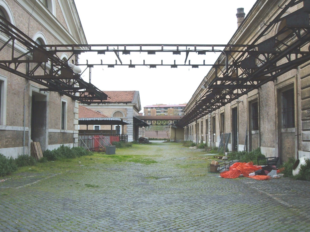 Immagine dell'interno dell'ex mattatoio di Roma